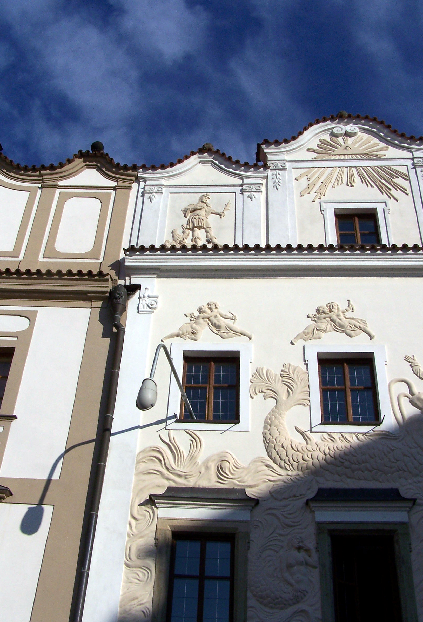 Krištof Kintera – lampa veřejného osvětlení prostrčená oknem Východočeské galerie v Pardubicích jako součást výstavy Believe it or not!